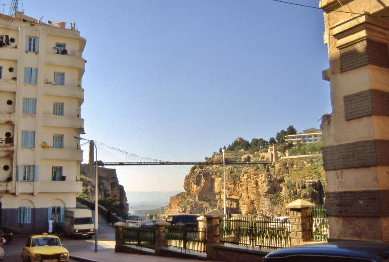 Pont du Rhumel